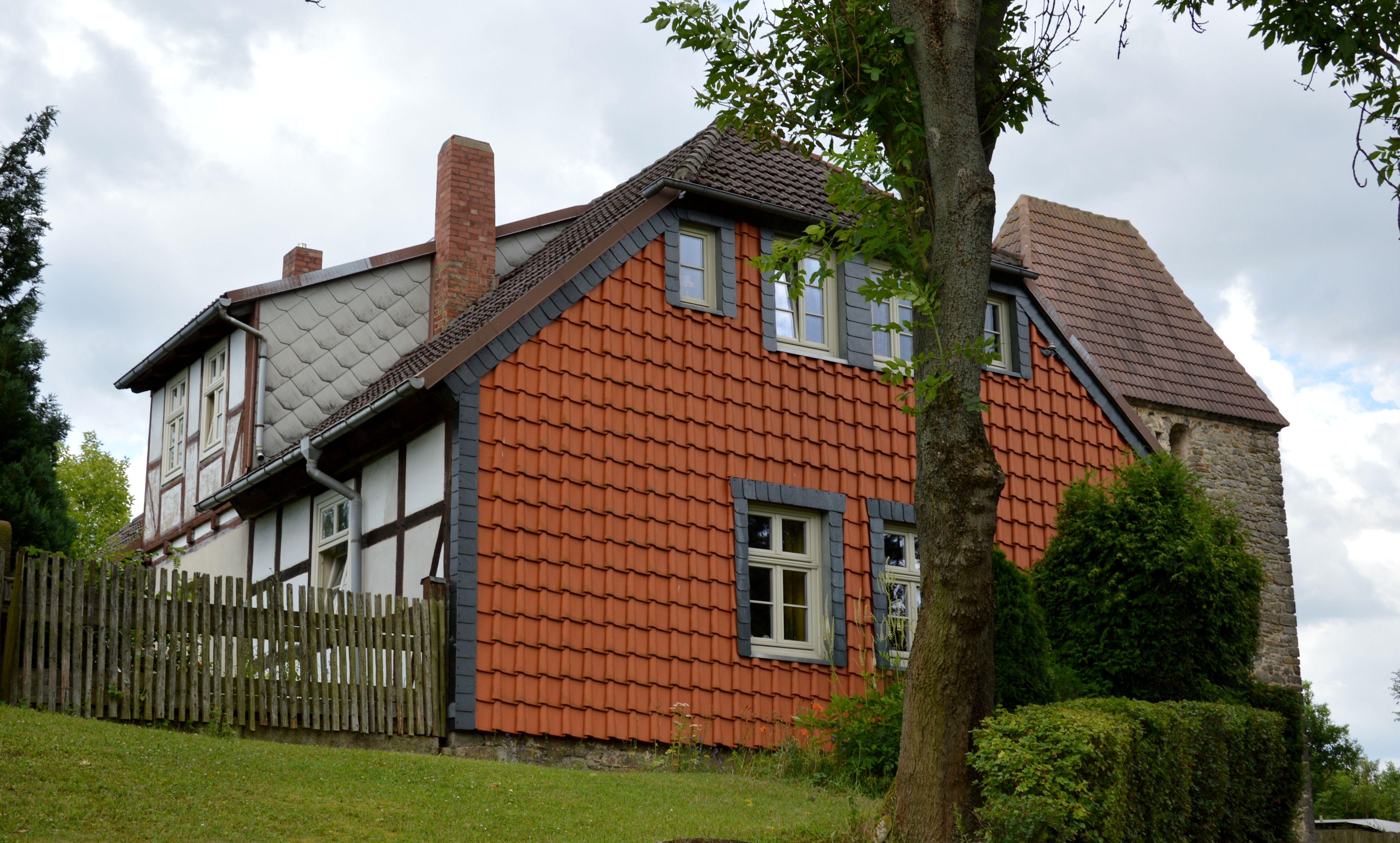 Haus Dorfstraße 9 in Groß Bartensleben